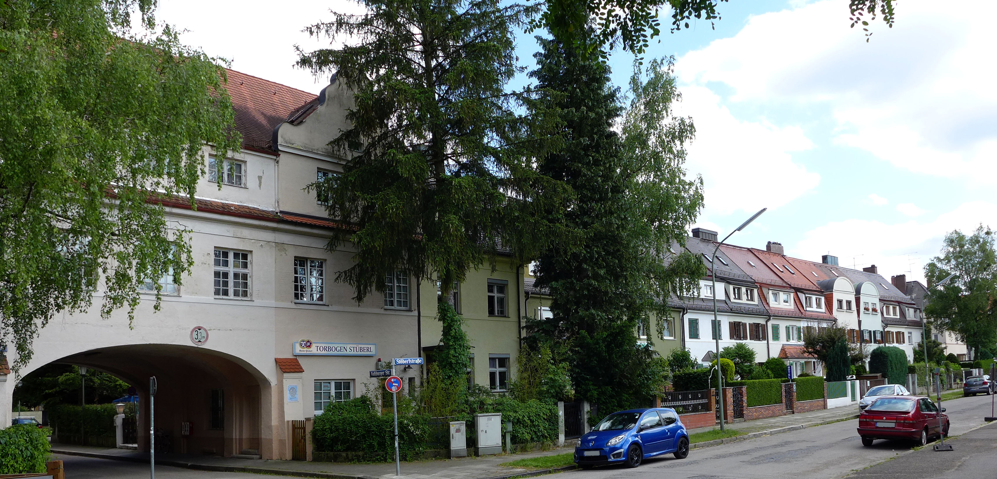 Stöberlstr. 37, München